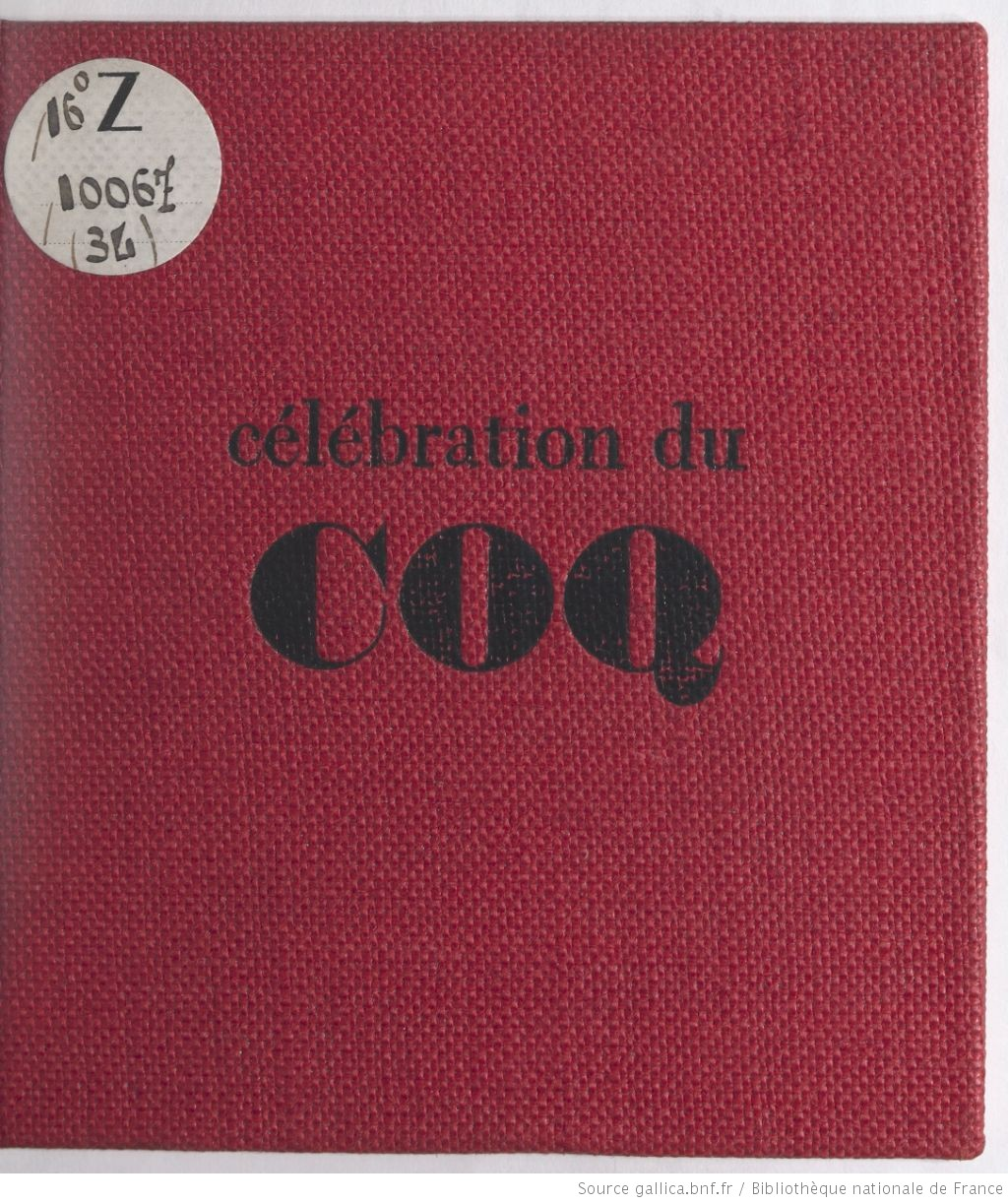 Célébration du coq, par Bernard Charbonneau